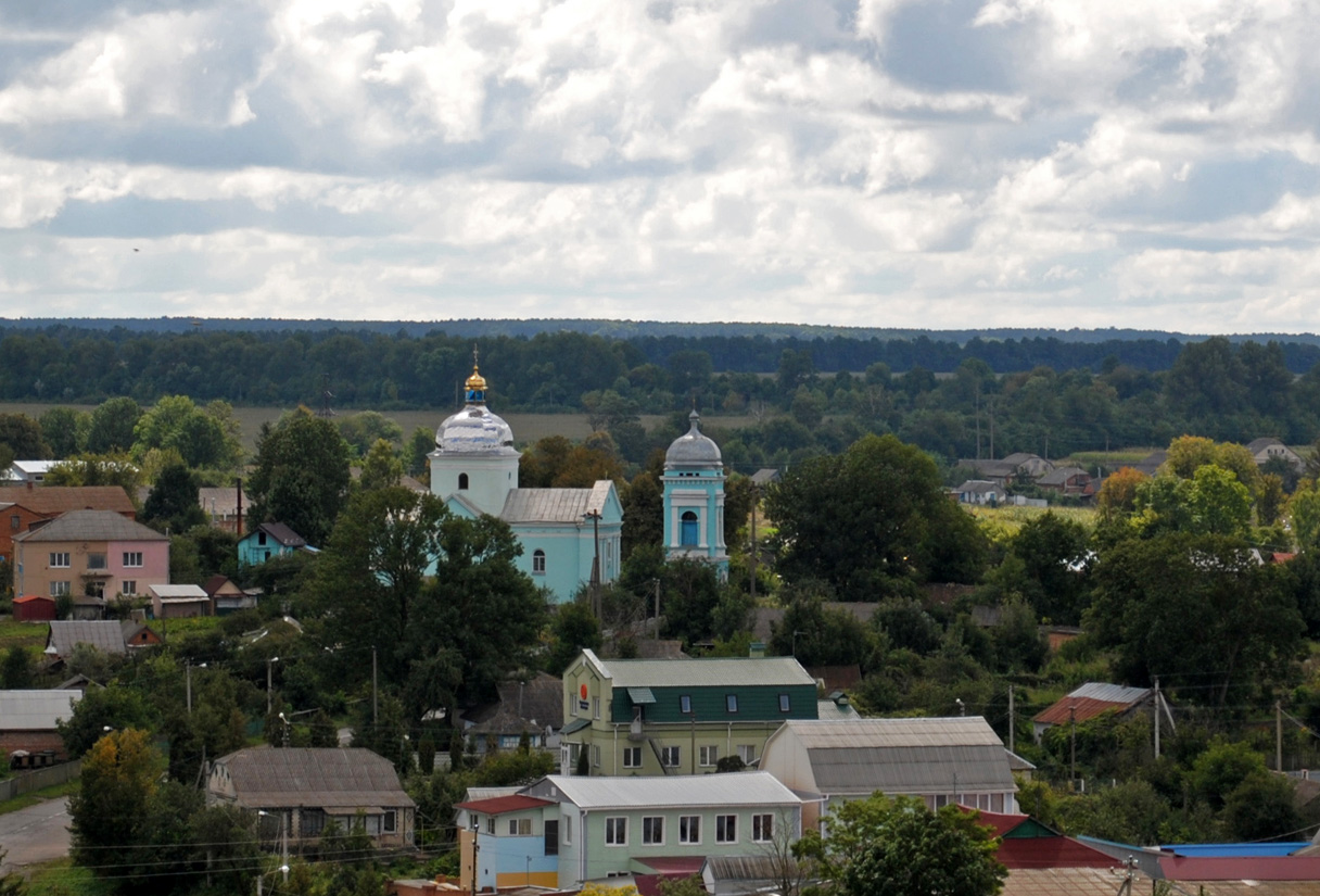 Комплекс споруд церкви Святого Іоанна Богослова, село Требухівці, вул. Леніна, 17